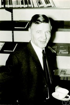 Foto di Adriaan Cornelis Zaanen